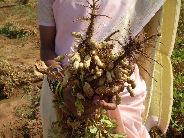 வேர்கடலை செடி சற்றுமுன் பிடுங்கப்பட்ட நிலையில்